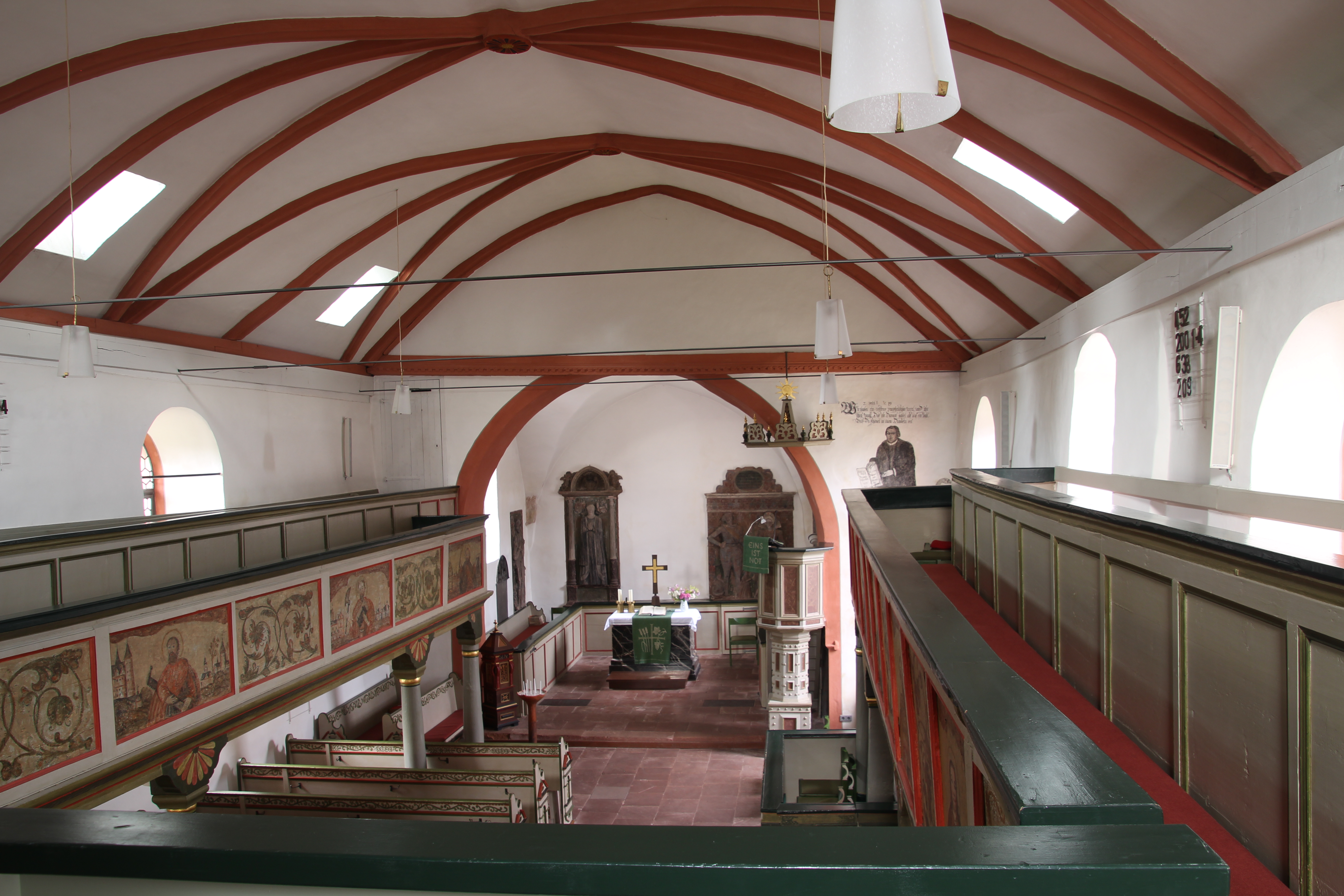 Siehe Bild und Dateiname